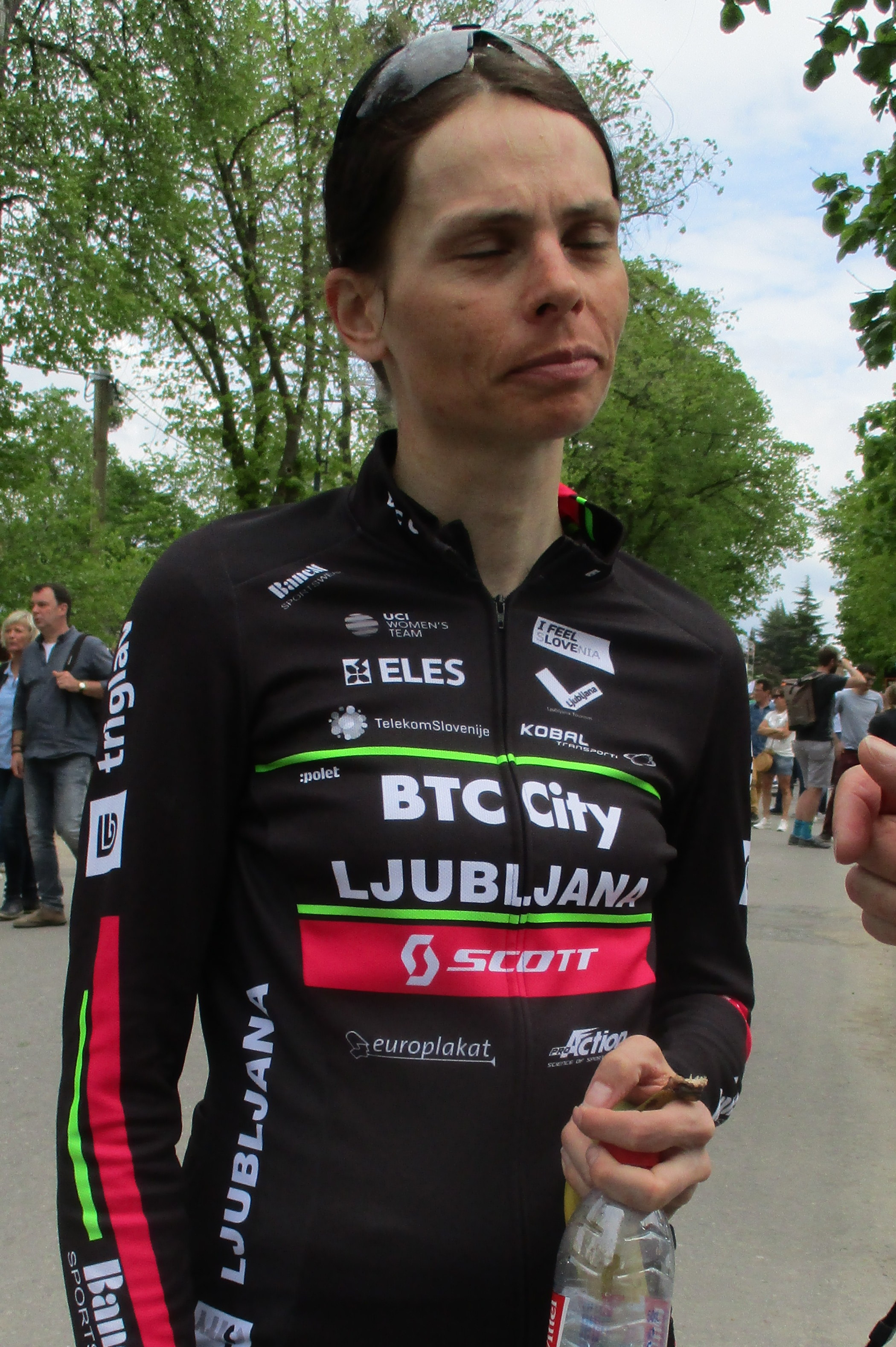 Finish van de Waalse Pijl 2019 voor vrouwen op de Mur de Huy